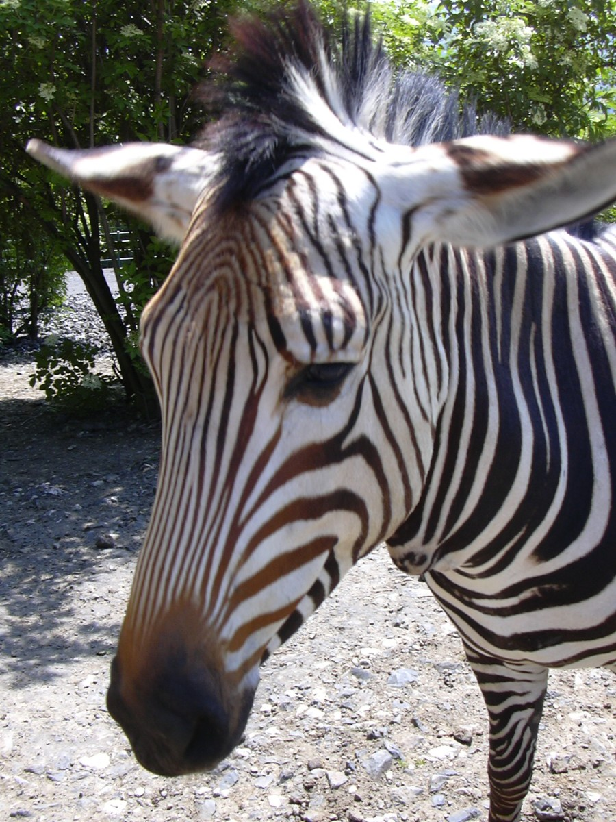 Hartmann's mountain zebra in Zoo Ústí nad Labem, Czechia